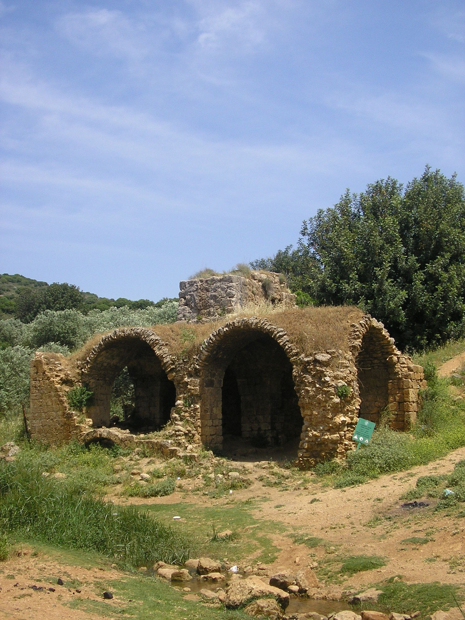 טחנה עתיקה בנחל צלמון - ancient mill in the Tzalmon creek